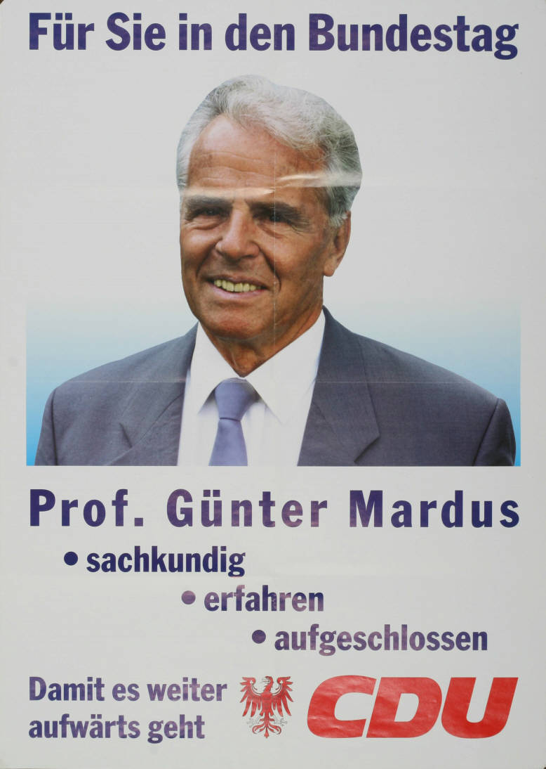 Für Sie in den Bundestag Prof. Günter Mardus . sachkundig . erfahren . aufgeschlossen Damit es weiter aufwärts geht CDU Abbildung: Porträtfoto - Brandenburgischer Adler Plakatart: Kandidaten-/Personenplakat mit Porträt Objekt-Signatur: 10-001: 4043 Bestand: Plakate zu Bundestagswahlen (10-001) GliederungBestand10-18: Plakate zu Bundestagswahlen (10-001) » Die 13. Bundestagswahl am 16. Oktober 1994 » CDU » Mit Porträtfoto Lizenz: KAS/ACDP 10-001: 4043 CC-BY-SA 3.0 DE